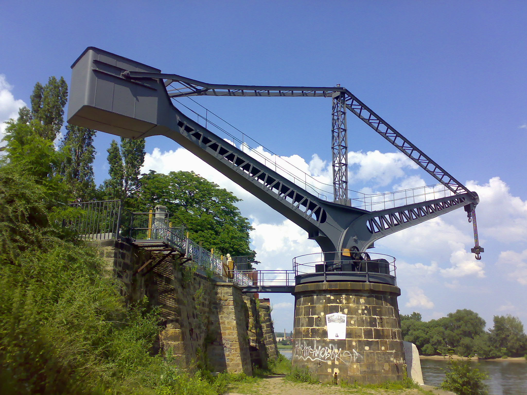 Kran an der Elbe in Übigau